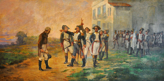 Momento em que o pai de José Peregrino, Augusto Xavier de Carvalho, com um crucifixo na mão, pede que o jovem filho se entregue às tropas portuguesas.